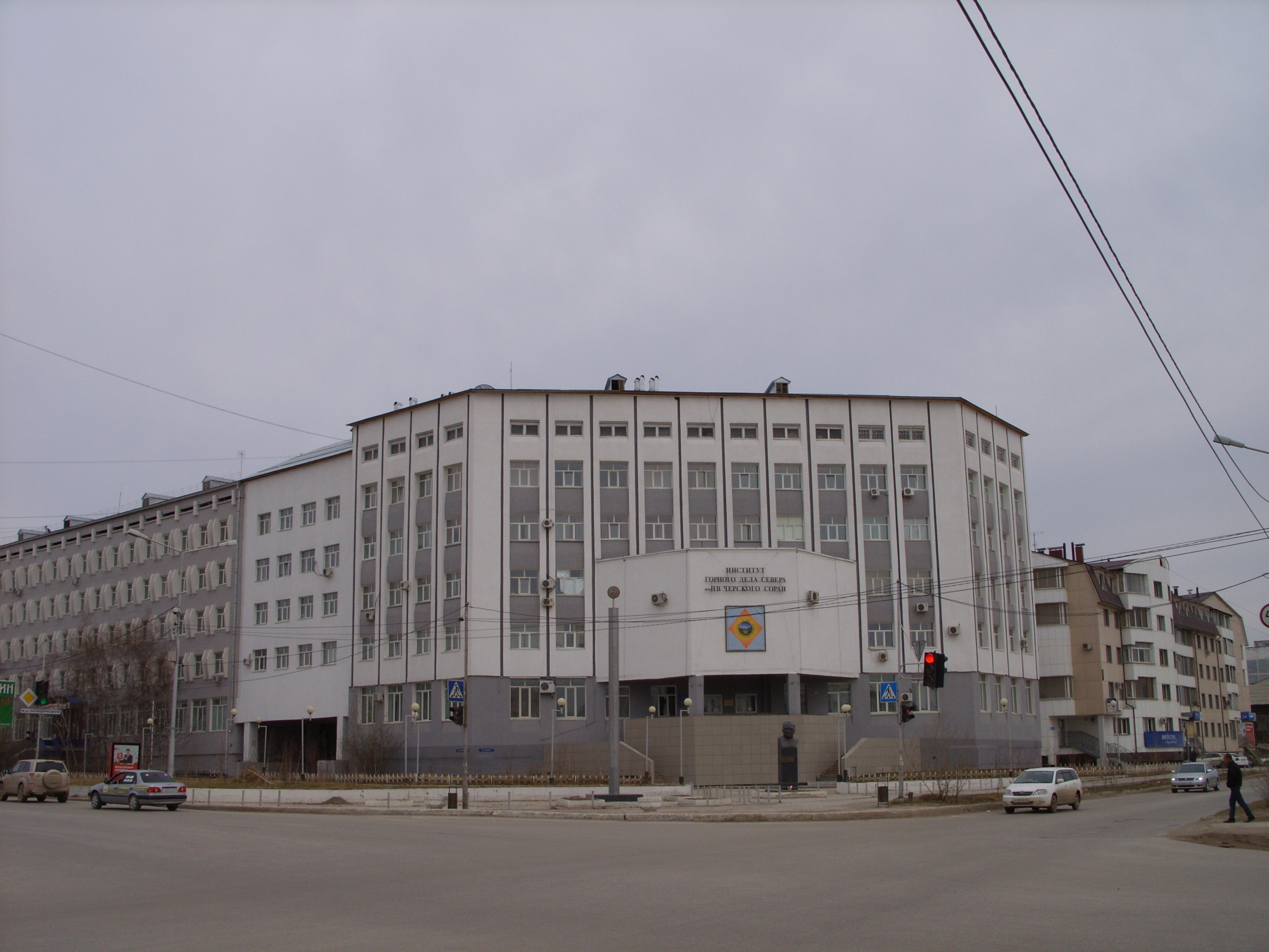 Институт горного дела севера им. Черского СО РАН